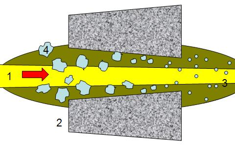 Drahtsägenprozess